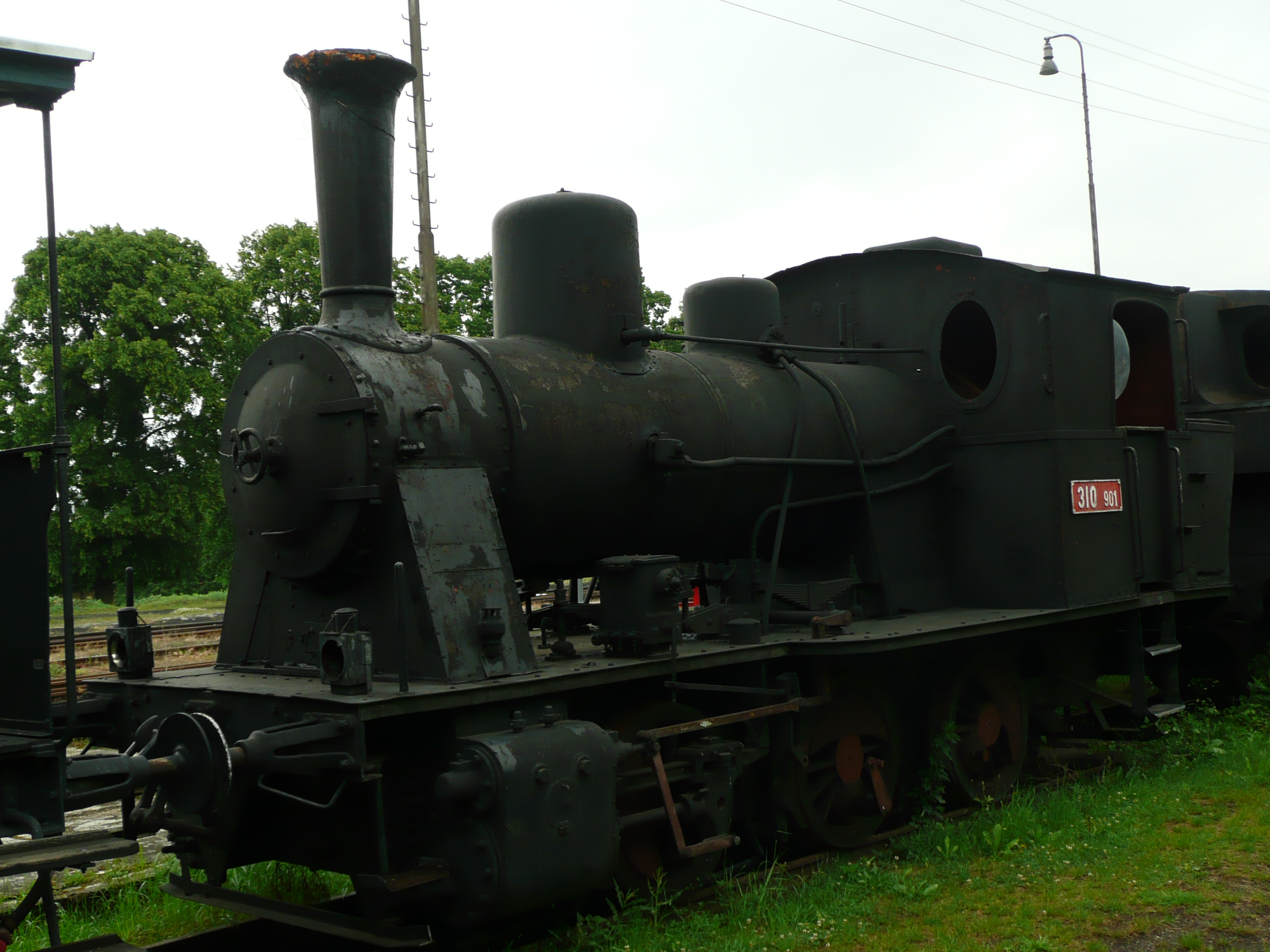 Lokomotive 310.449 im Eisenbahnmuseum Zlonice